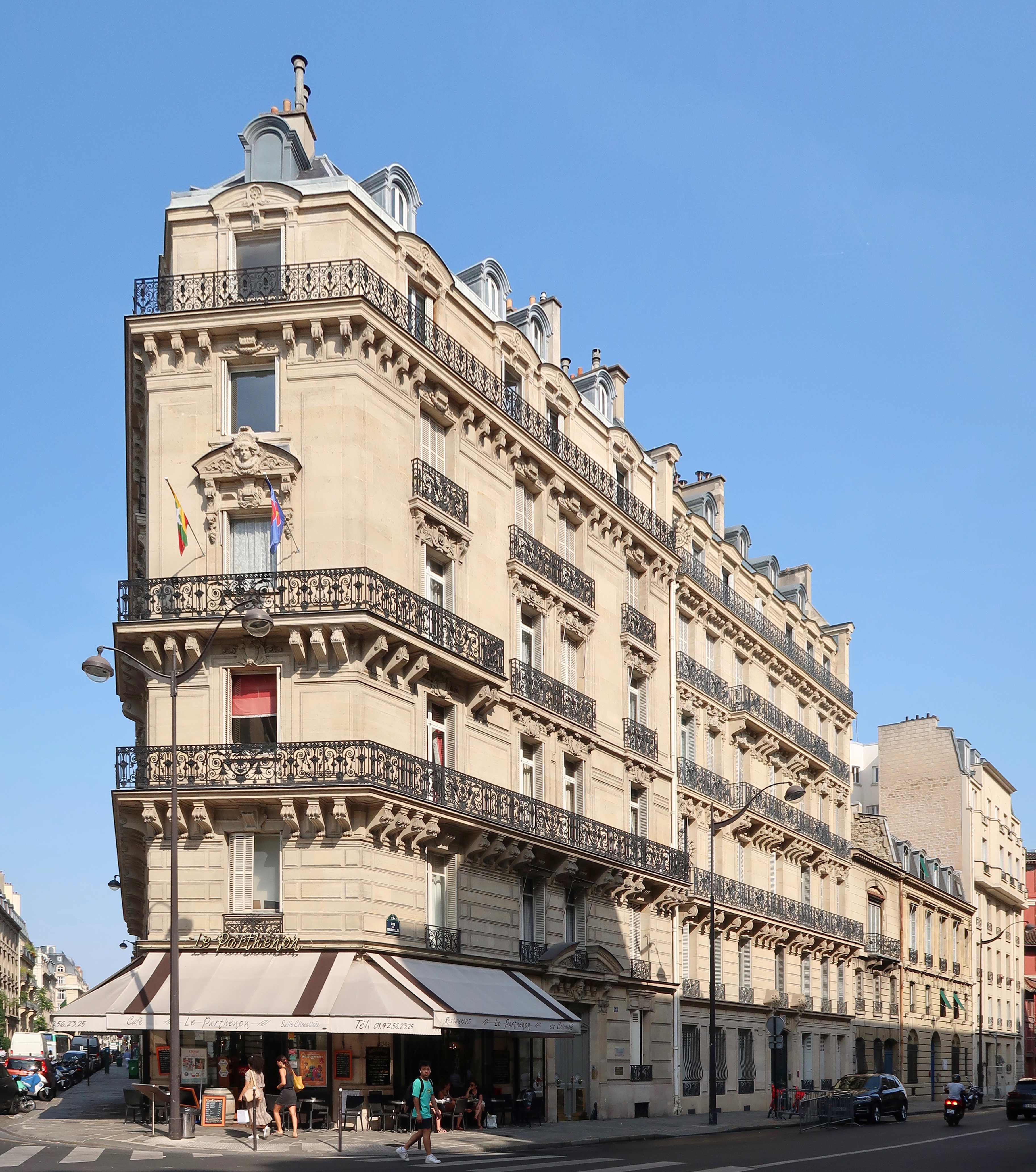 Restaurant Le Parthénon, 60 rue de Courcelles (Paris, 8e).